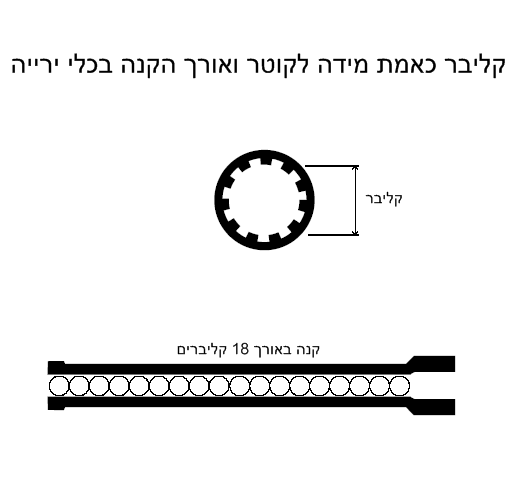 תרגום לעברית של תמונה מויקי שיתוף